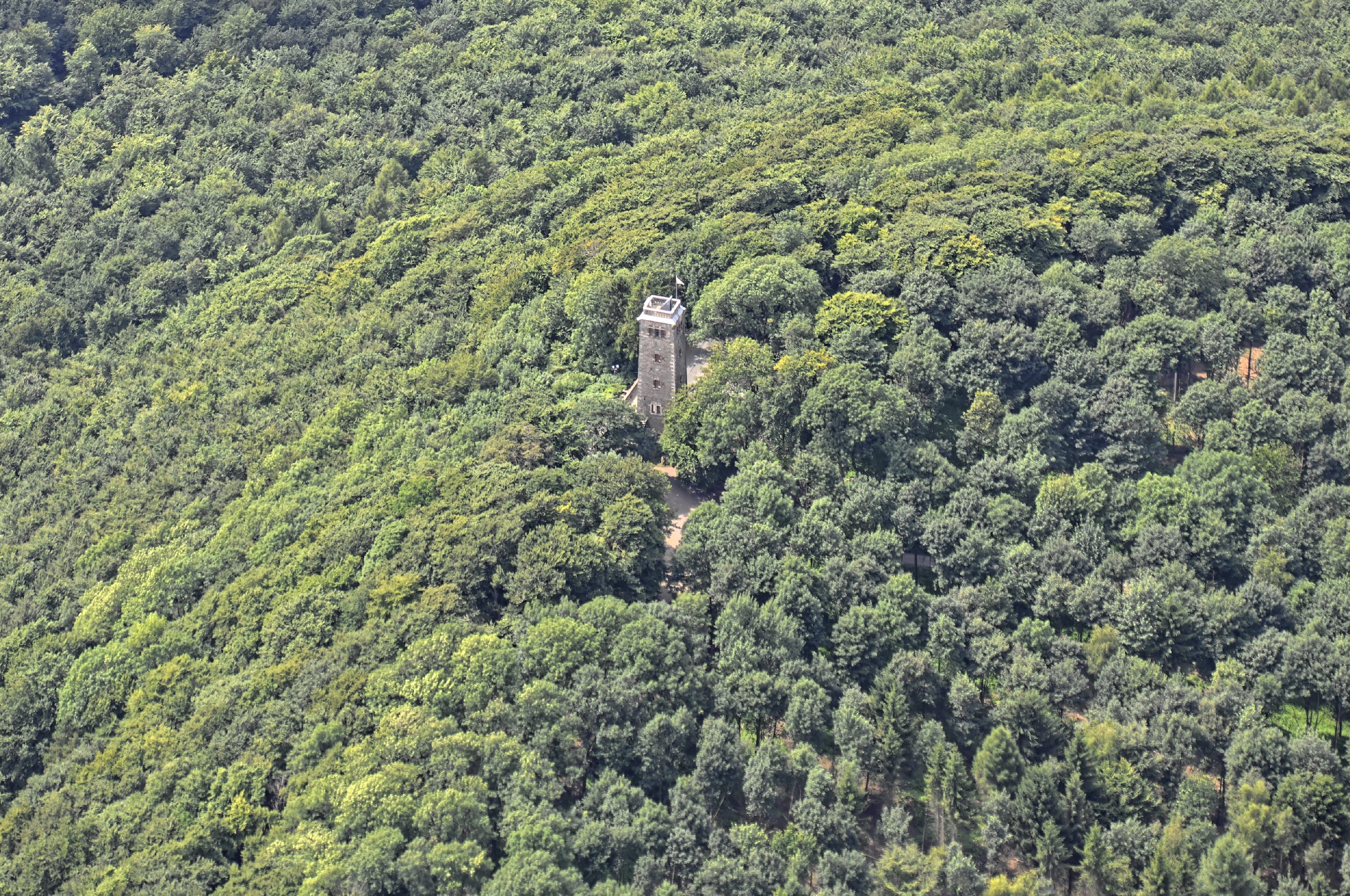 Bilder vom Flug Nordholz-Hammelburg 2015: Der Klippenturm bei Rinteln